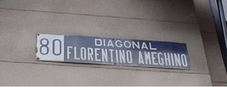 Placa de nomenclatura de Diagonal 80 en La Plata. Argentina.